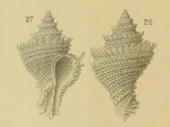 カセンガイ Babelomurex lischkeanus (Dunker, 1882) --Dunker, 1882より。（Rapana lischkeana Dkr. var. -- Dunker, 1882, Pl. 13, Figs. 26-27.）